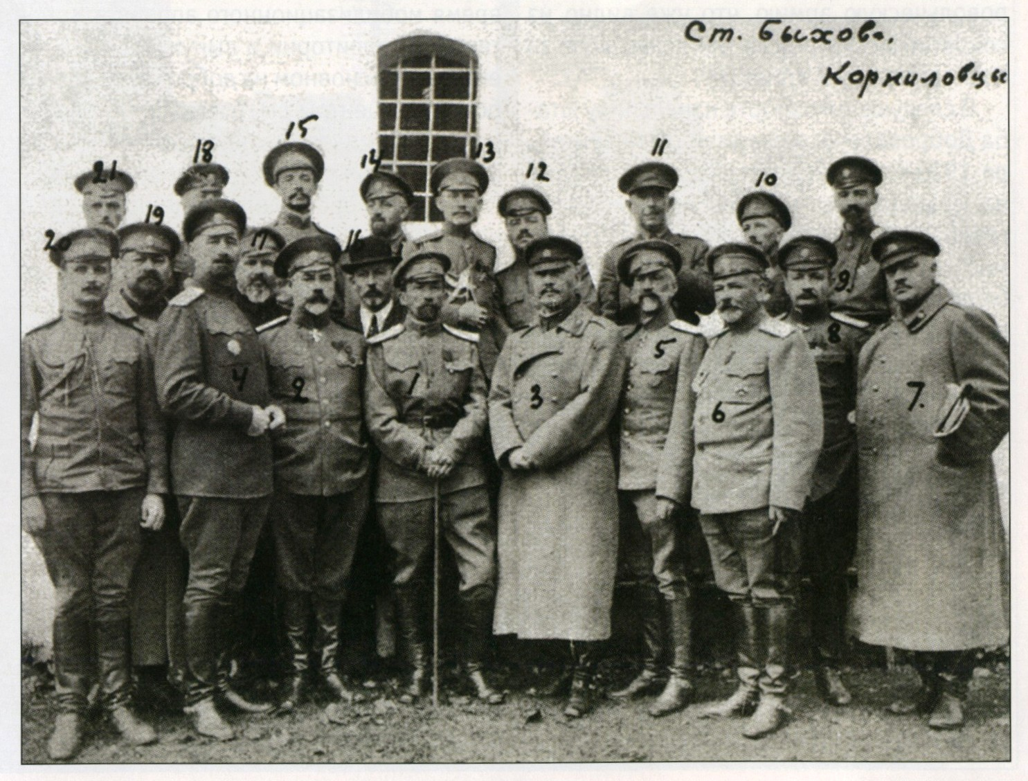 Генералитет, узники быховской тюрмы осенью 1917 года. По номерам: 1. Л. Г. Корнилов. 2. А. И. Деникин. 3. Г. М. Ванновский. 4. И. Г. Эрдели. 5. Е. Ф. Эльснер. 6. А. С. Лукомский. 7. В. Н. Кисляков. 8. И. П. Романовский. 9. С. Л. Марков. 10. М. И. Орлов. 11. Л. Н. Новосильцев. 12. В. М. Пронин. 13. И. Г. Соотс. 14. С. Н. Ряснянский. 15. В. Е. Роженко. 16. А. П. Брагин. 17. И. А. Родионов. 18. Г. Л. Чунихин. 19. В. В. Клецанда. 20. С. Ф. Никитин. Осень 1917 года